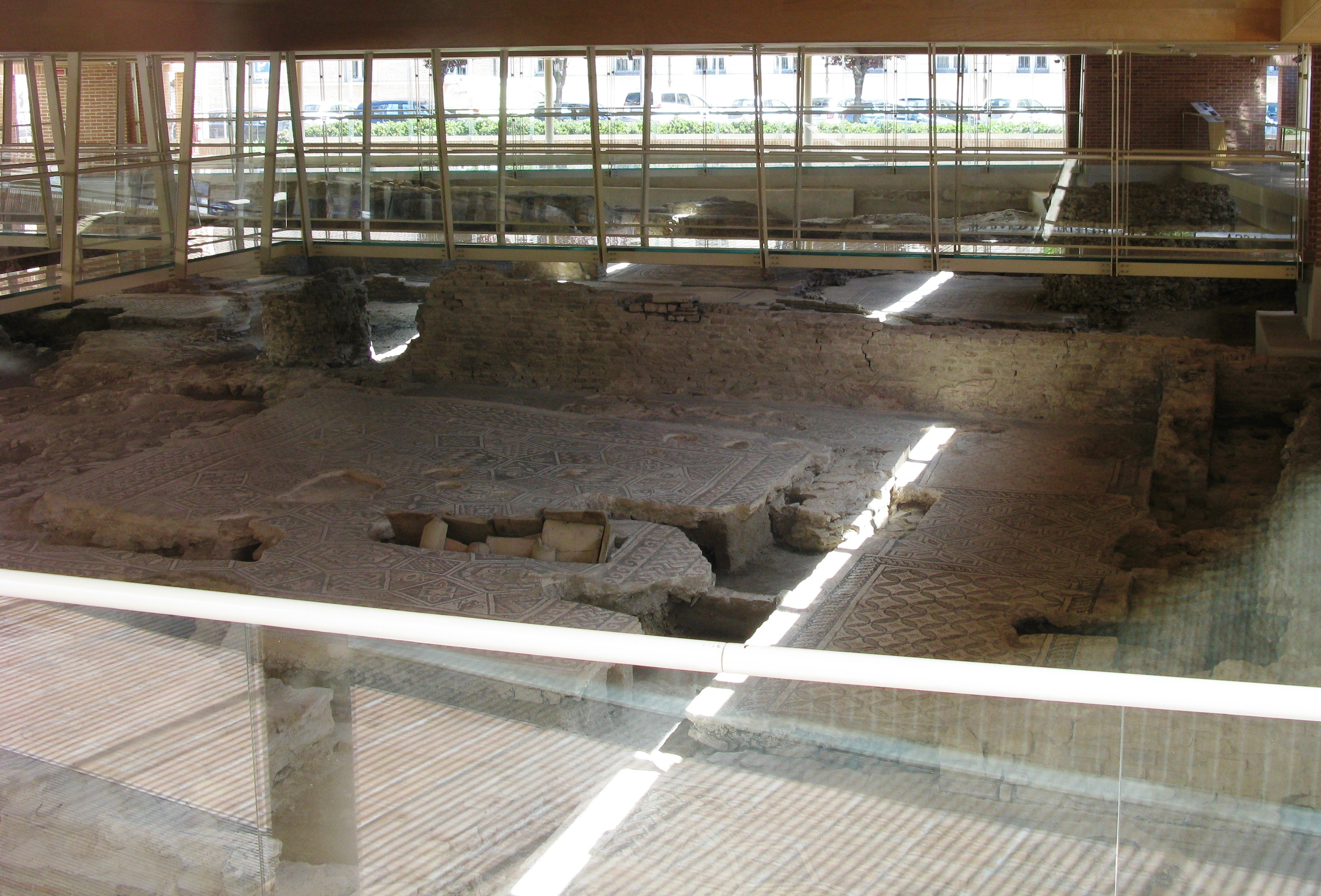 Domus del Chirurgo, Rimini.